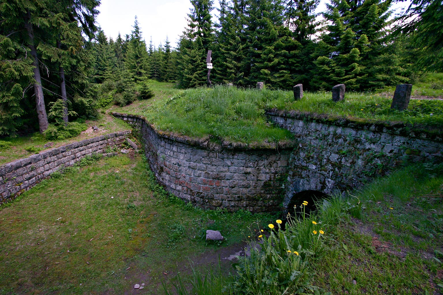 Ústí přepadového kanálu protržené přehrady na Desné. (vlastní fotografie)